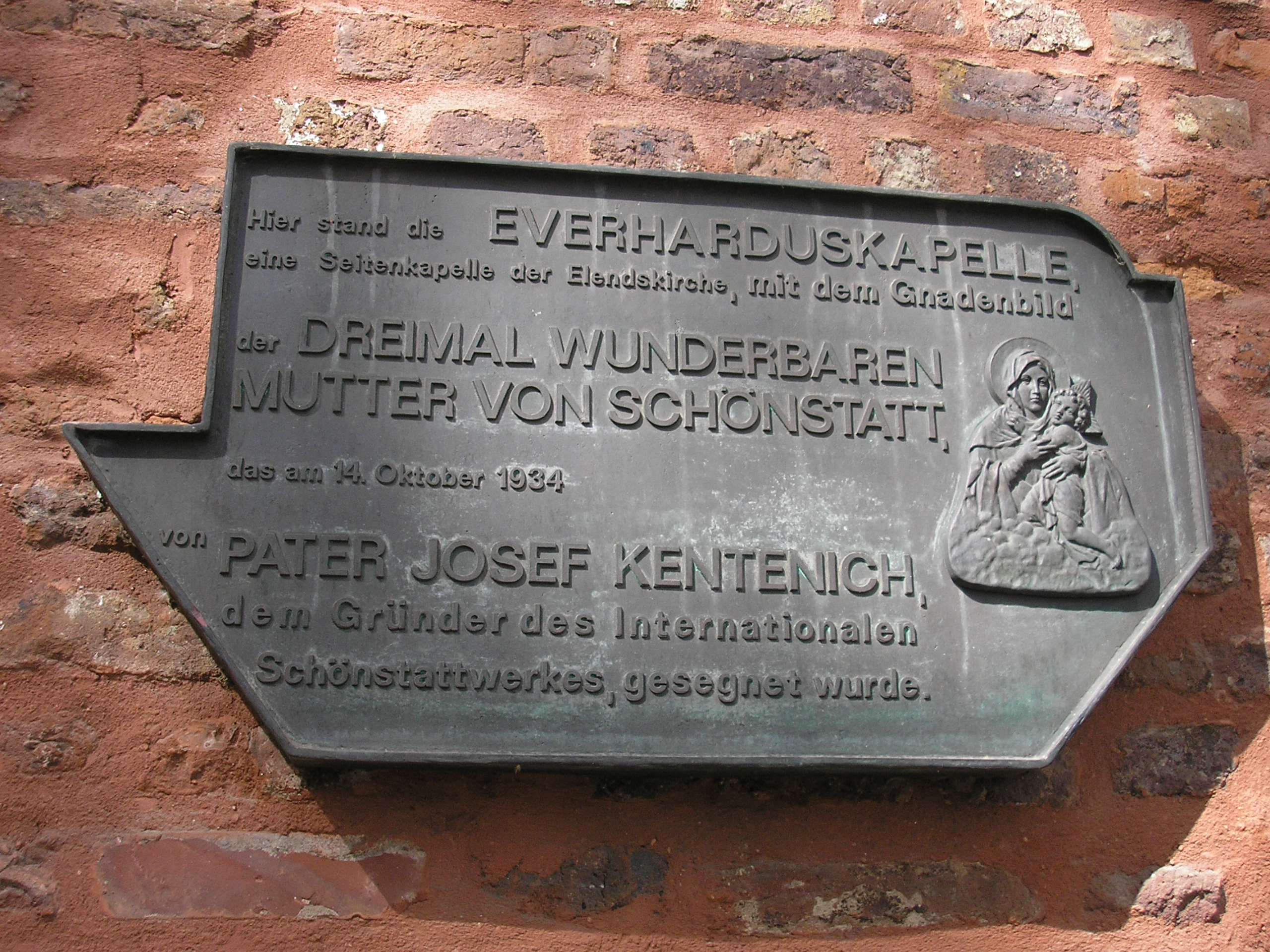 Erinnerungstafel an die Everharduskapelle in der Kölner Südstadt.